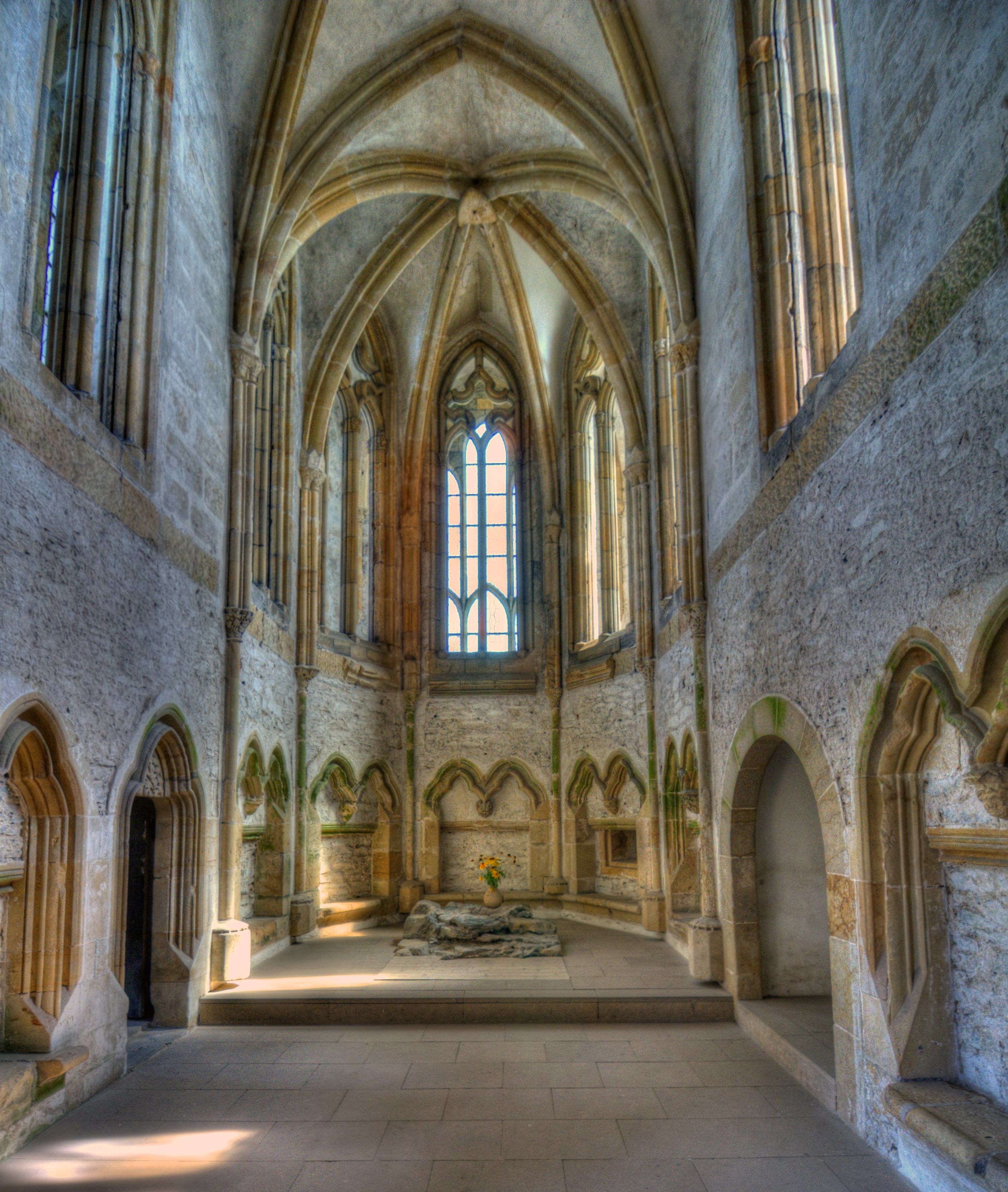 Interiér hradní kaple Panny Marie, pohled do presbytáře